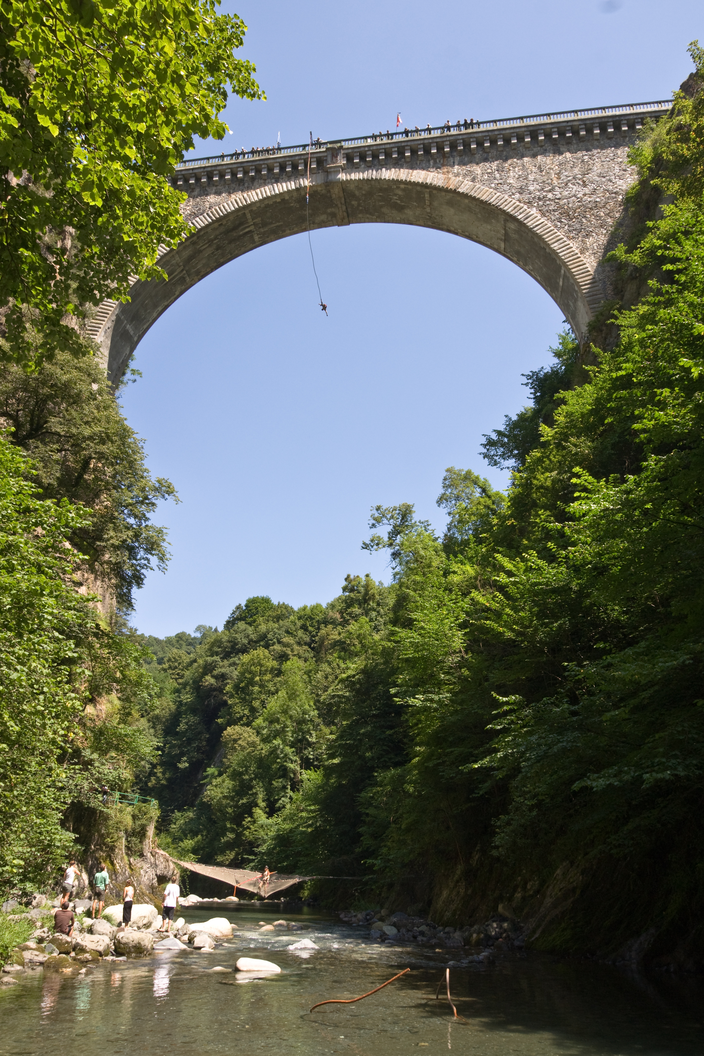 Luz Saint Sauveur (Hautes Pyrénées) - Pont Napoléon